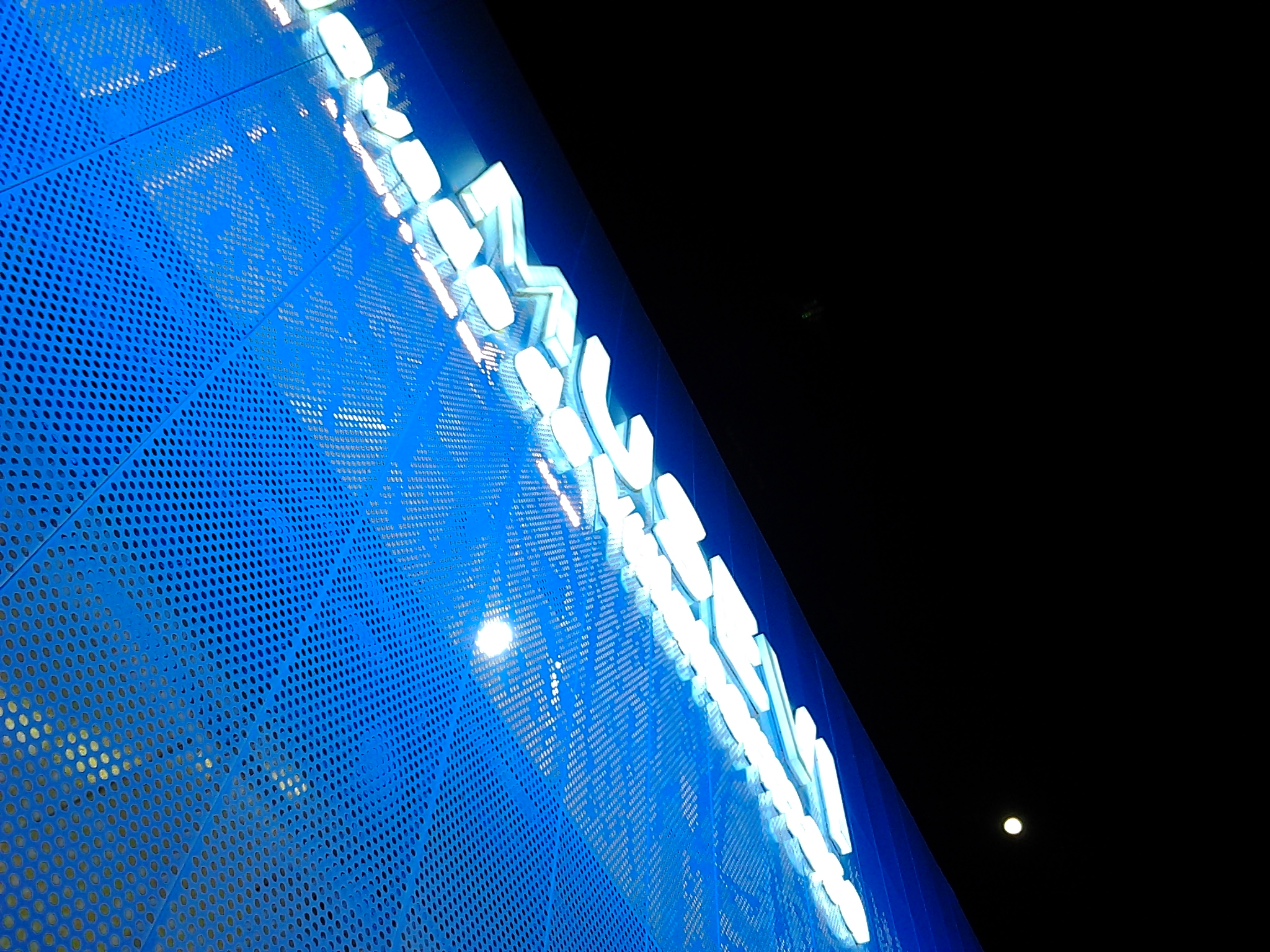 Fachada del museo mientras es iluminada. Se aprecia la luna.